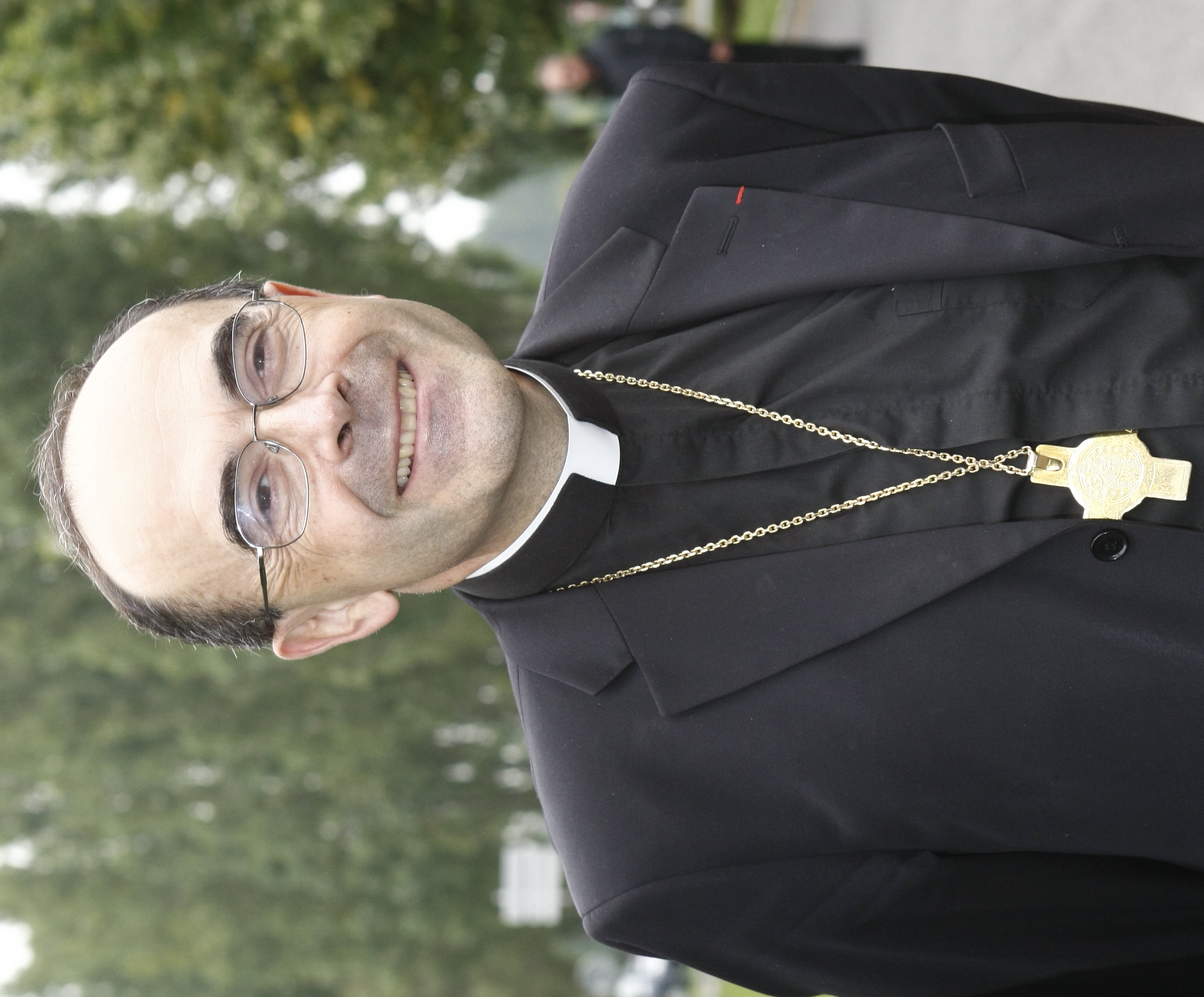 Cardinal Philippe Barbarin, Archevêque de Lyon